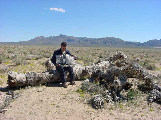 Der tote Joshua Tree des U2 LP Covers